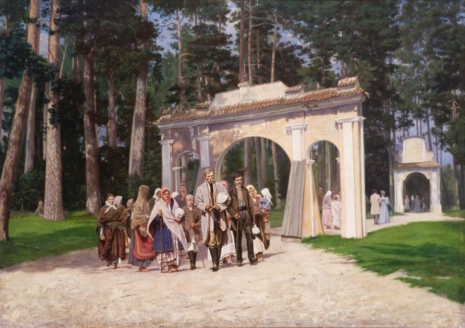 Беларуская (тарашкевіца): Вільня (Vilnia), Кальварыя (Kalvaryja)